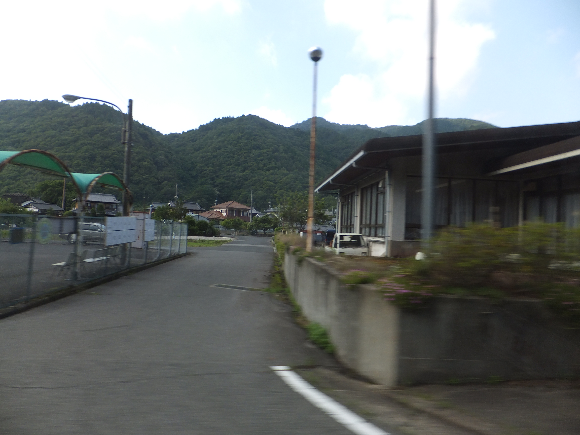 兵庫県神戸市北区山田町衝原道南